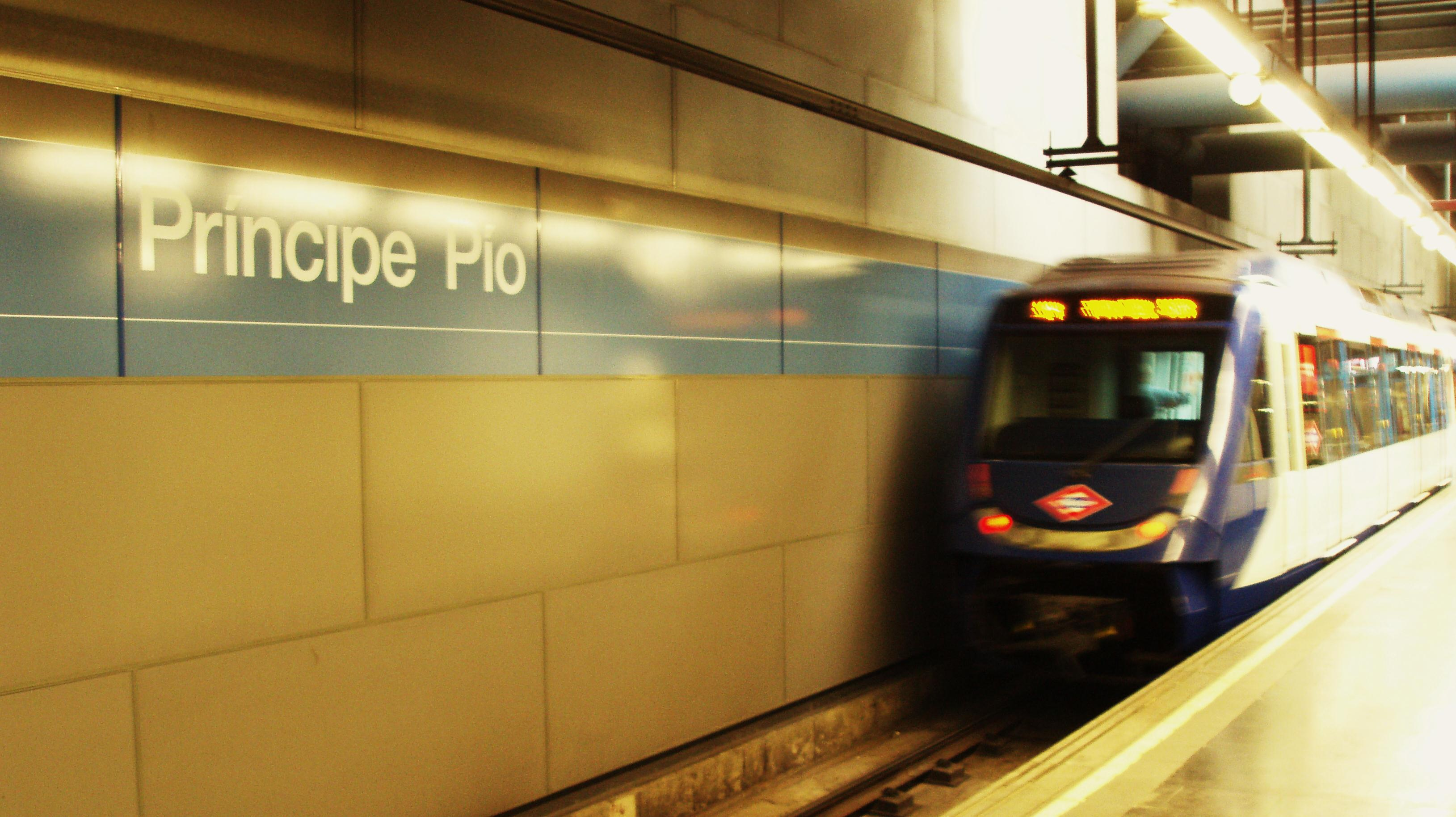 Andén de la línea 10 de metro en la estación madrileña de Príncipe Pío.